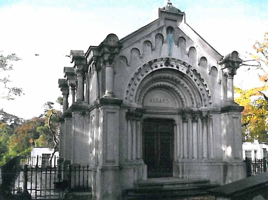 Le mausolée Allard à Uccle